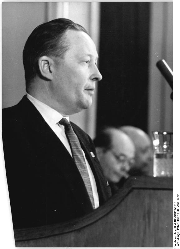 Zentralbild/Junge 28.3.1962 Volkskammer der DDR berät Volkswirtschaftsplan und Staatshaushaltsplan 1962 - Dr. Lothar Bolz gibt aussenpolitische Erklärung ab Die Volkskammer der Deutschen Demokratischen Republik trat am 28.3.1962 zu ihrer 22. Sitzung zusammen. Zu Beginn gab der Minister für Auswärtige Angelegenheiten, Dr. Lothar Bolz, eine Erklärung zu aussenpolitischen Fragen ab. Im Mittelpunkt der Volkskammersitzung stehen die erste und zweite Lesung des Beschlusses der Volkskammer über den Volkswirtschaftsplan 1962 und des Gesetztes über den Staatshaushaltsplan 1962. UBz.: Als Berichterstatter des Wirtschaftsausschusses der Volkskammer spricht der Abgeordnete Heinrich Meier.